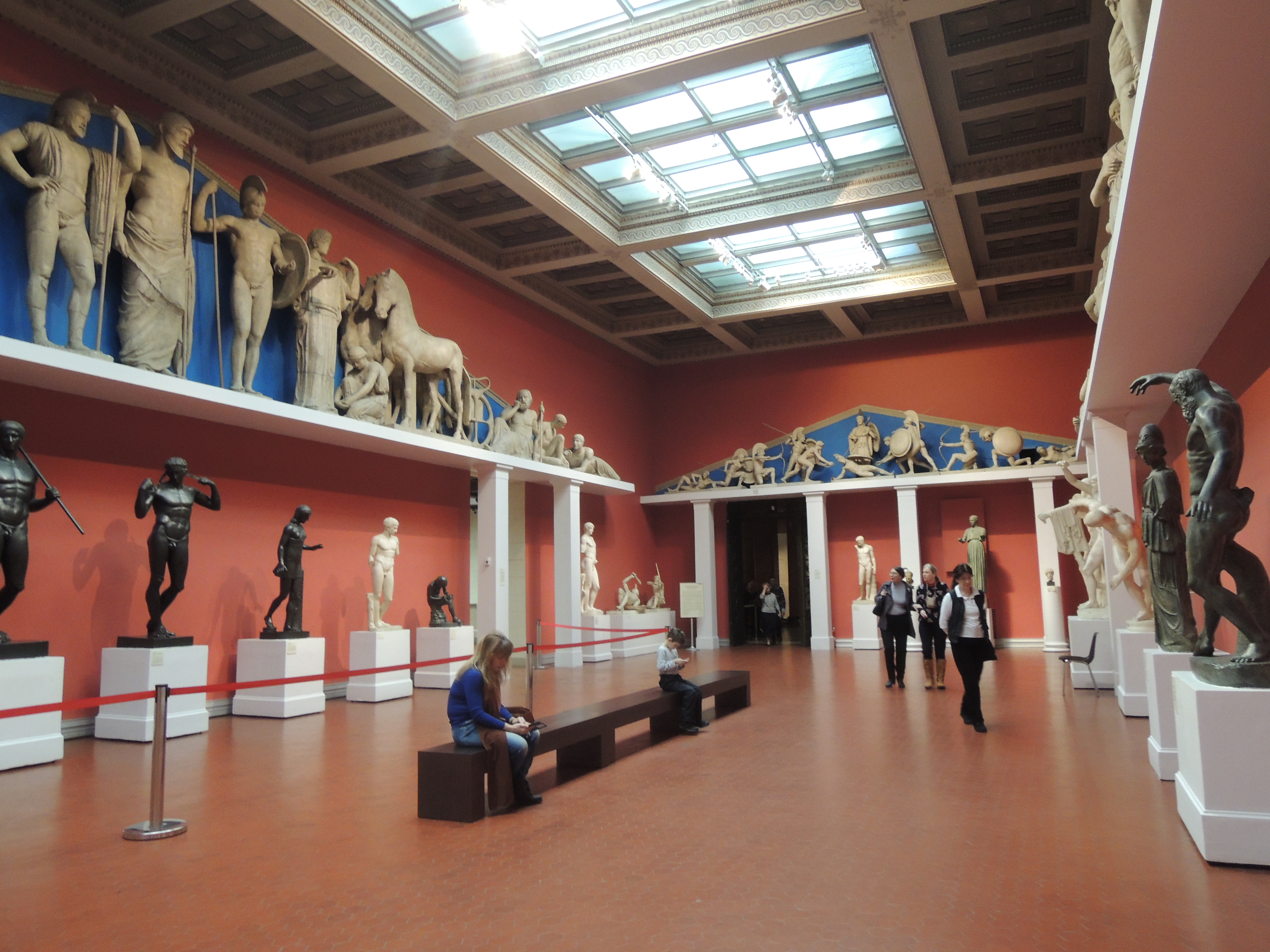 Слепки в Пушкинском музее